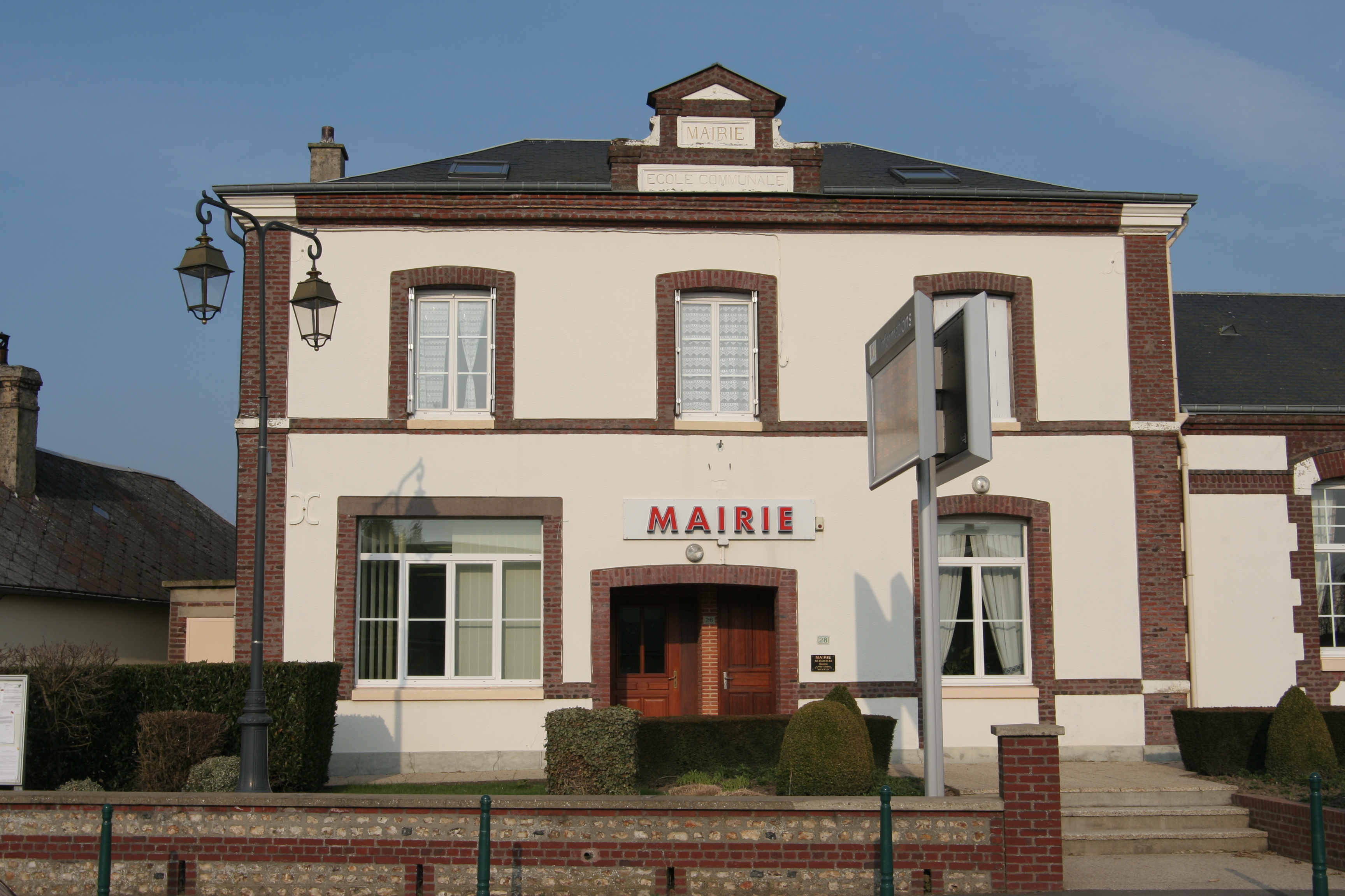 Mairie de Saint-Vigor-d'Ymonville.